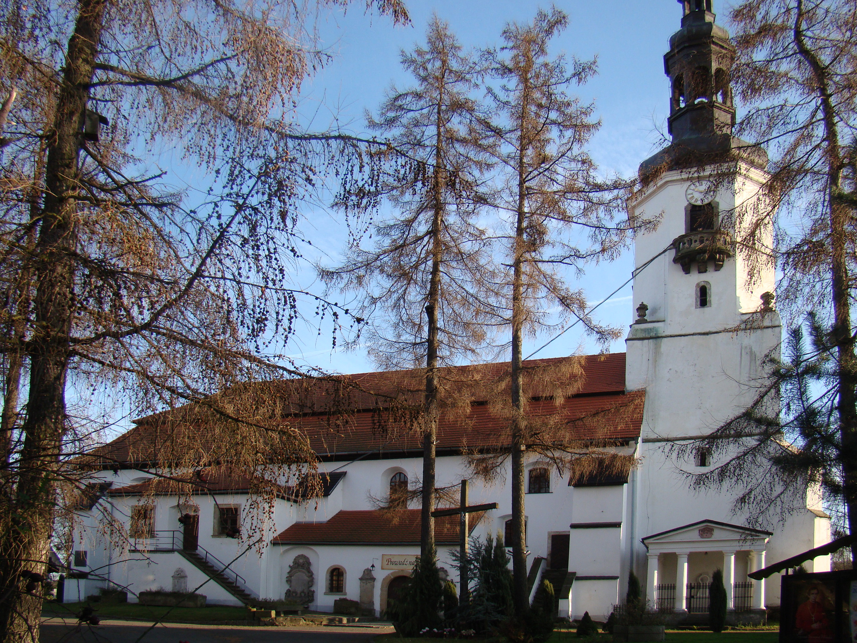 Pielgrzymka - kościół parafialny p.w. św. Jana Nepomucena, XIII, XVI, 1 poł. XVIII (zabytek nr 533 z 23.02.1959)